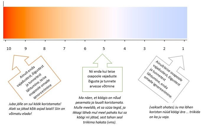 Kolme käitumisiviisi emotsionaalne temperatuur, hoiakuline taust ja näited.